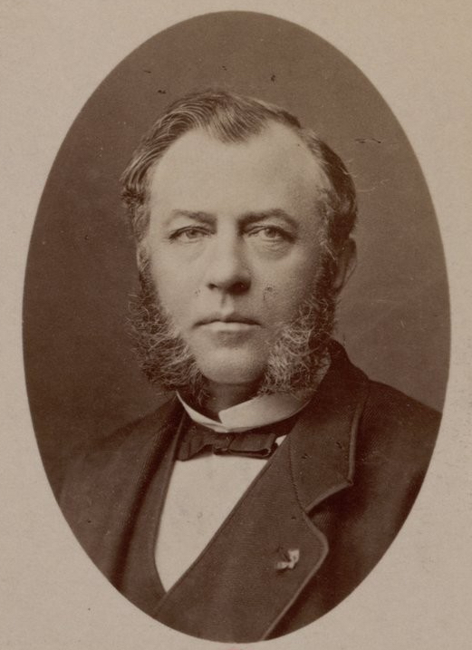 M. Menier - (photographie, tirage de démonstration) - (Atelier Nadar)